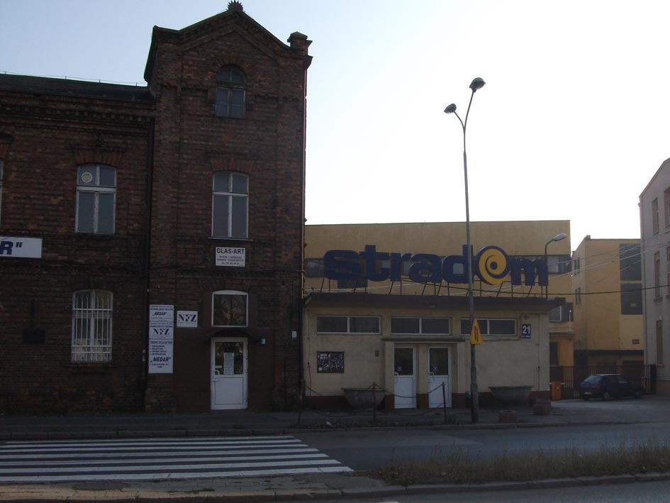 Częstochowa-Stradom, ul. 1 Maja. Główna portiernia zakładów włókienniczych Stradom SA (dawnych Częstochowskich Zakładów Przemysłu Lniarskiego "Stradom").